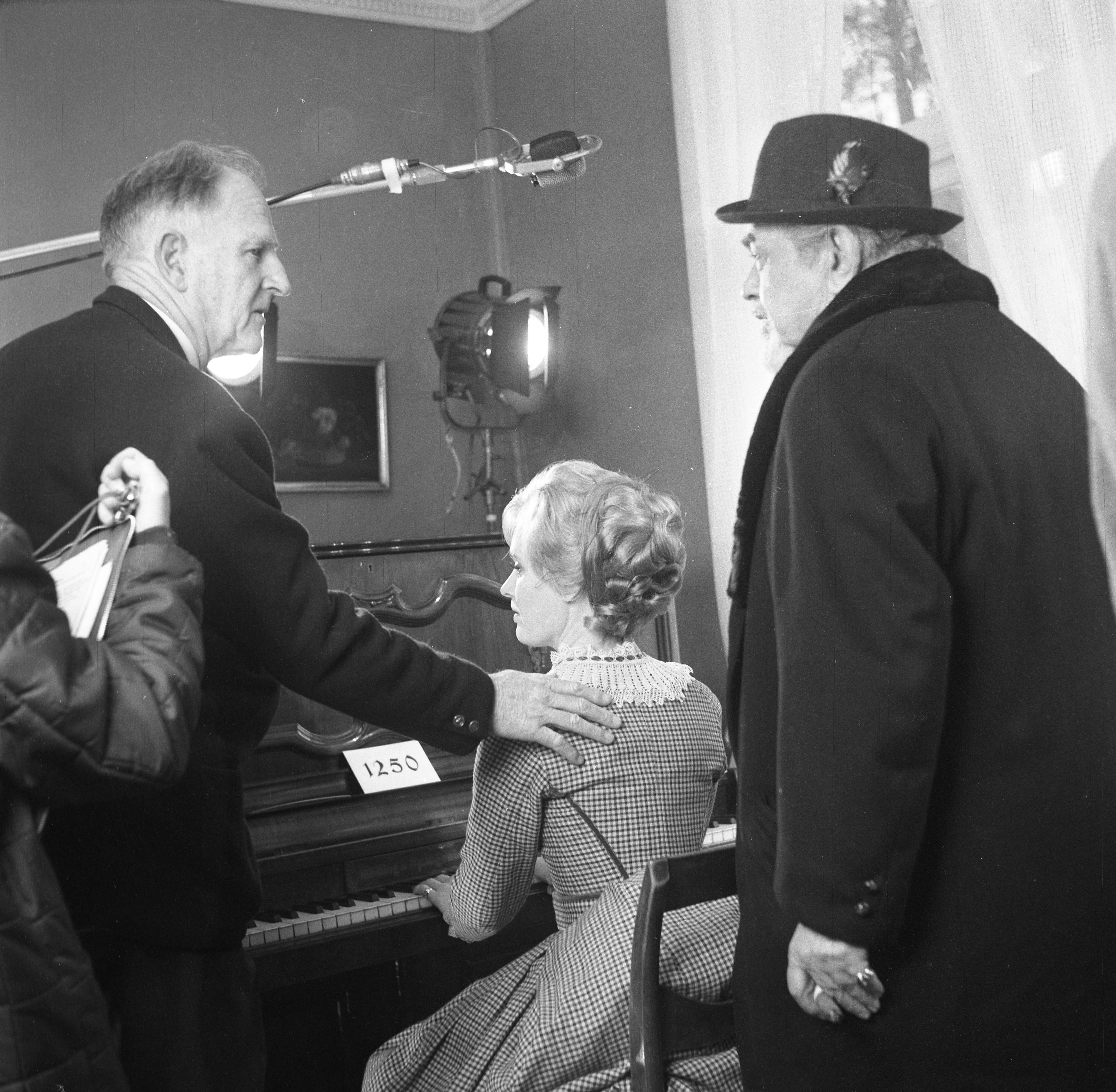 Format: 120 mm sort/hvitt negativ Dato/Date: April 1969 Fotograf/Photographer: Eirik Sundvor (1902–1992) Sted/Place: Bergen, Hordaland Wikipedia: Andrew L. Stone (1902–1999) Wikipedia: Florence Henderson (1934–2016) Wikipedia: Edward G. Robinson (1893–1973) Eier/Owner Institution: Trondheim byarkiv, The Municipal Archives of Trondheim Arkivreferanse/Archivereference: Tor.H43.B78. Merknad: Manusforfatter, regissør og produsent Andrew L. Stone instruerer skuespillerne Florence Henderson (Nina Hagerup) og Oskar Homolka (Engstrand) på filmsettet til musicalen om Edvard Grieg kalt "Song of Norway". Deler av filmen ble innspilt i Bergen i april 1969, og filmen ble utgitt i USA den 4 November 1970. Toralv Maurstad spilte hovedrollen som Edvard Grieg. Florence Henderson, mest kjent som Carol Brady i "The Brady Bunch", spilte Edvard Griegs framtidige kone Nina Hagerup. Regissøren omtalte Henderson som den nye Julie Andrews.